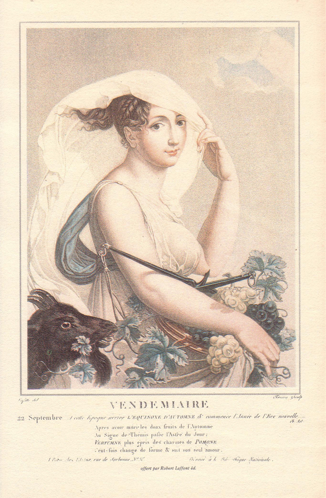 French Revolutionary Calendar VENDÉMIAIRE 22 Septembre: à cette époque arrive l'EQUINOXE D'AUTOMNE & commence l'Année de l'Ere Nouvelle Après avoir mûri les deux fruits de l'automne Au signe de Thémis pâlit l'Astre du Jour VERTUMNE plus épris des charmes de POMONE Cent fois change de forme & suit son seul amour